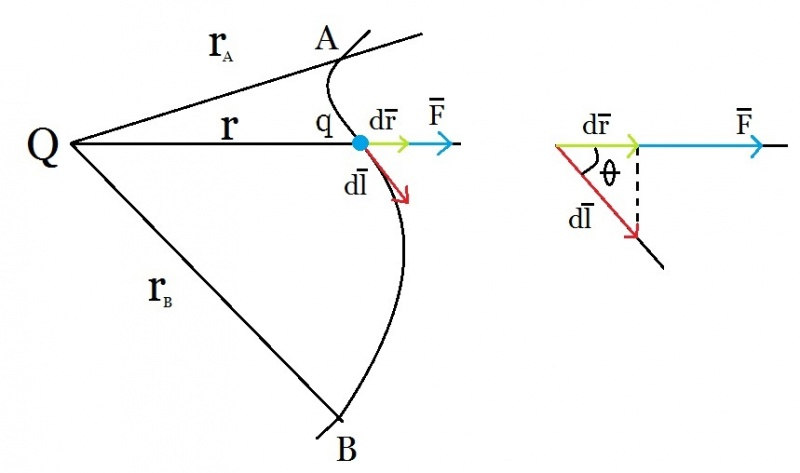 Explicación del trabajo eléctrico realizado al trasladar una carga q, debido al campo eléctrico creado por otra carga Q